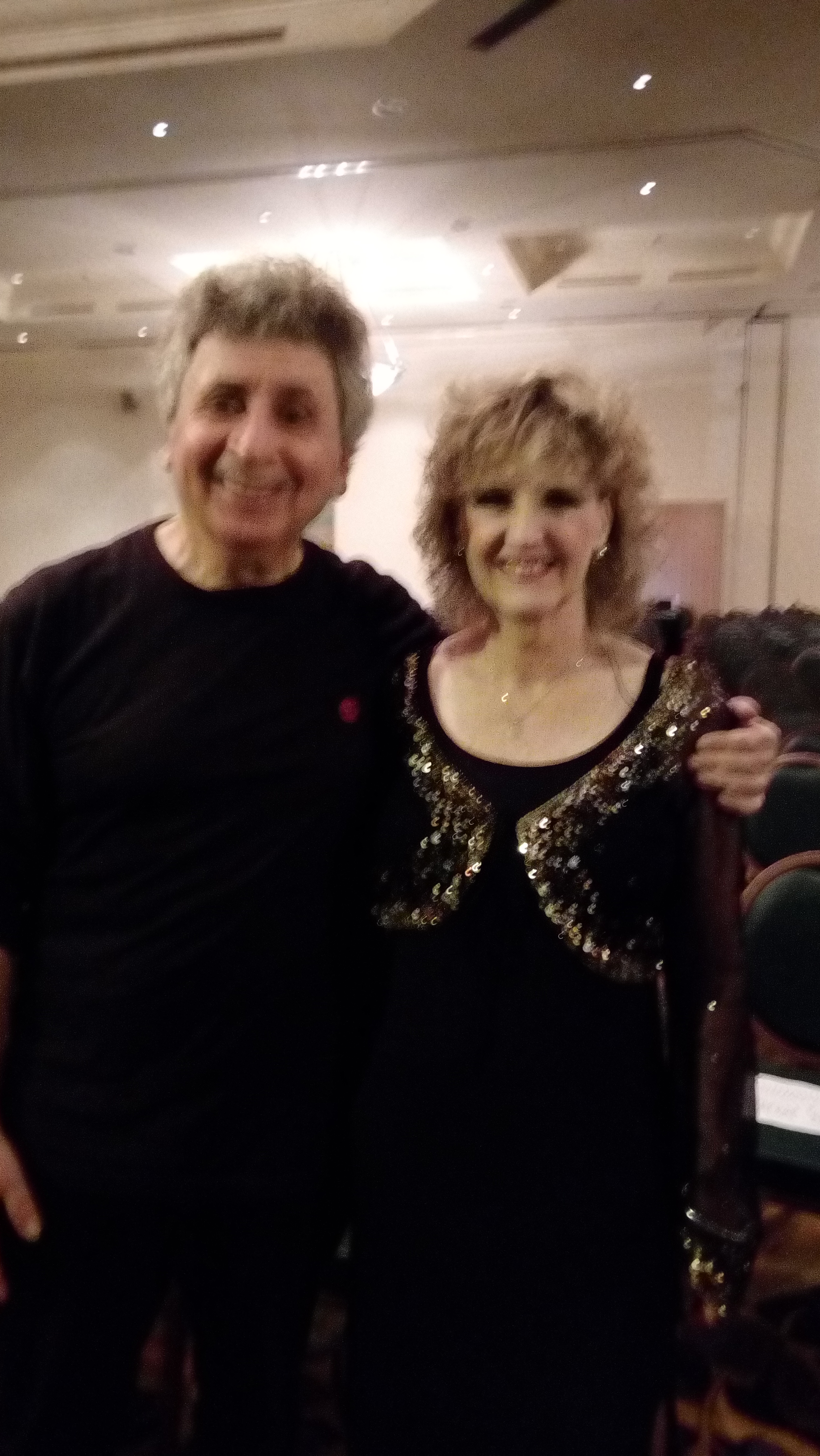 שוקי ודורית, מרץ 2017